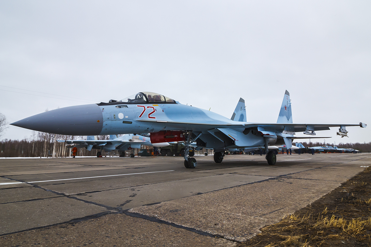 Лётно-тактическое учение "Ладога-2019" с экипажами 105-й гвардейской смешанной авиационной Борисовской Померанской дважды Краснознамённой, ордена Суворова дивизии Западного военного округа в Республике Карелия